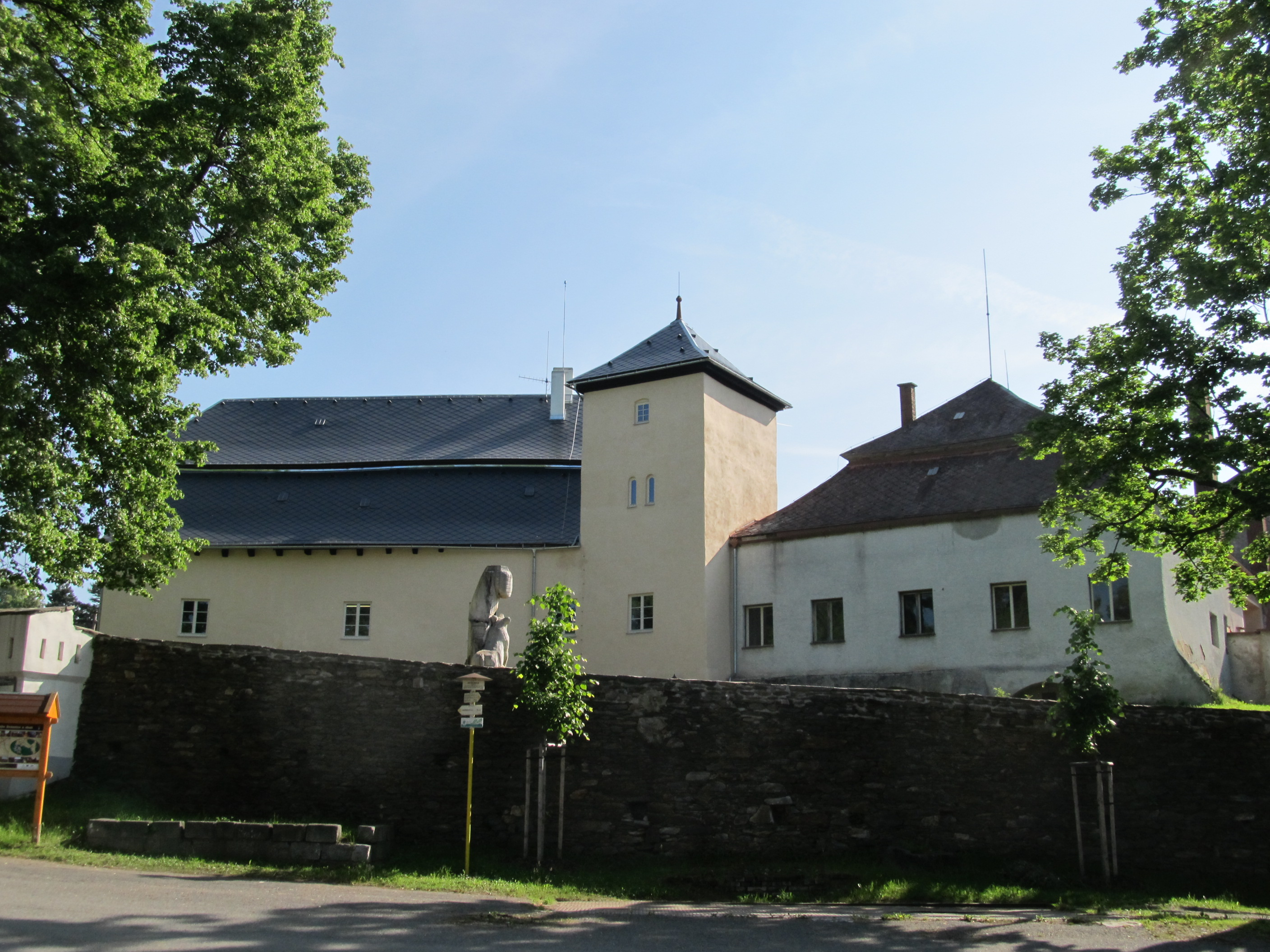 Dešenice - tvrz